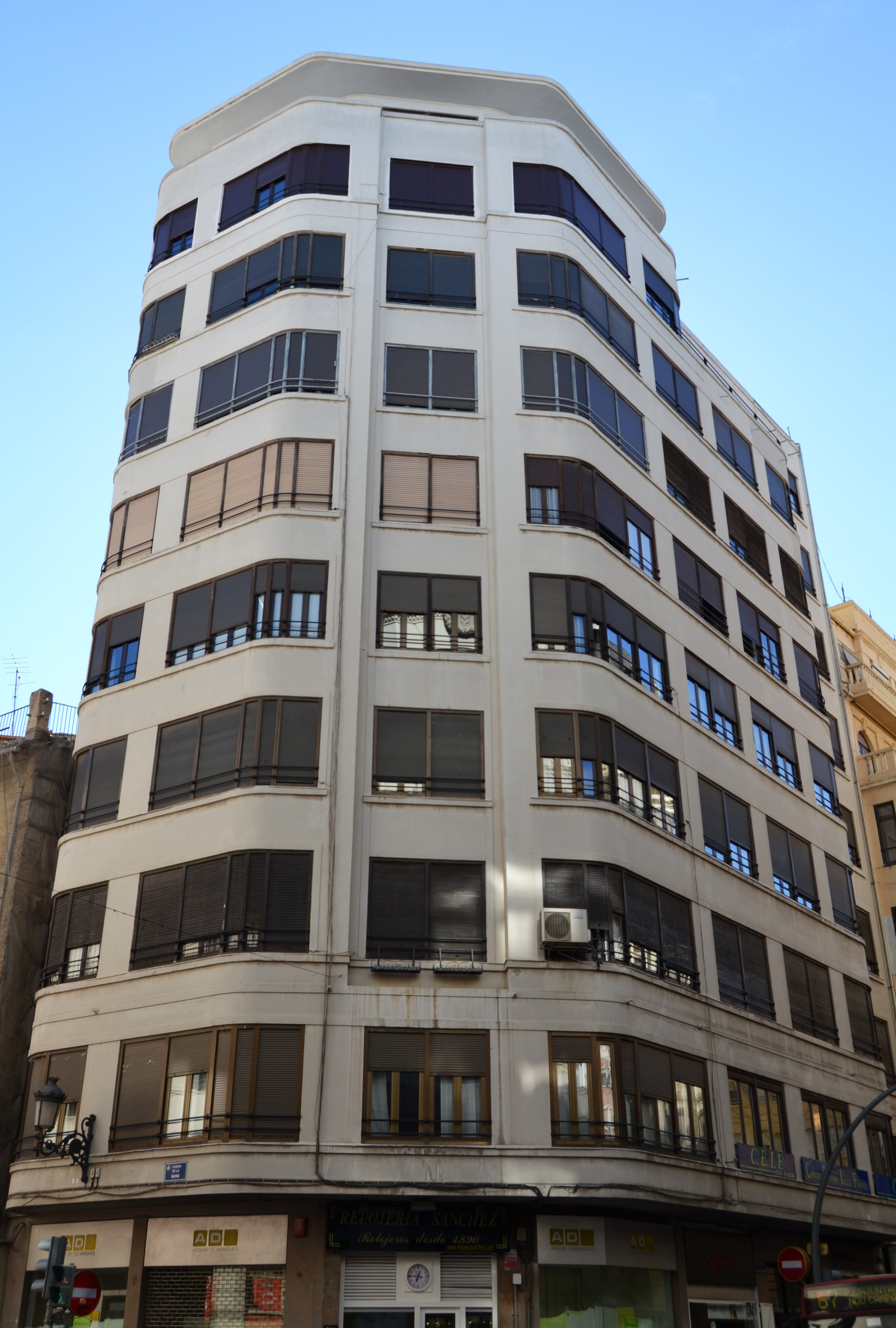 Edifici Llopis de València, de Ricard Roso Olivé. Situat al carrer de sant Vicent, es construí el 1934.